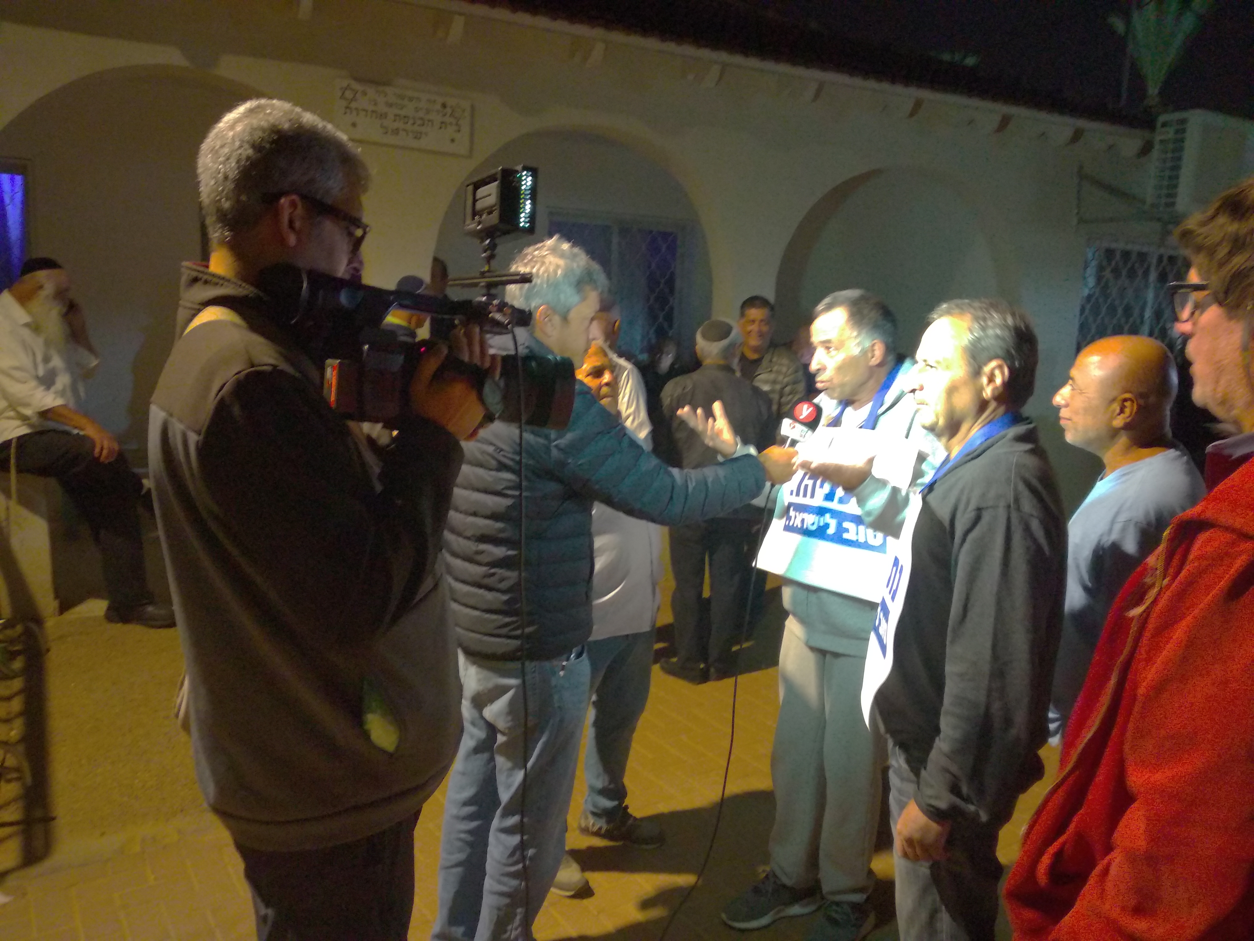 כתב וצלם ynet מראיינים בכניסה לעצרת של בנימין נתניהו בהרצליה